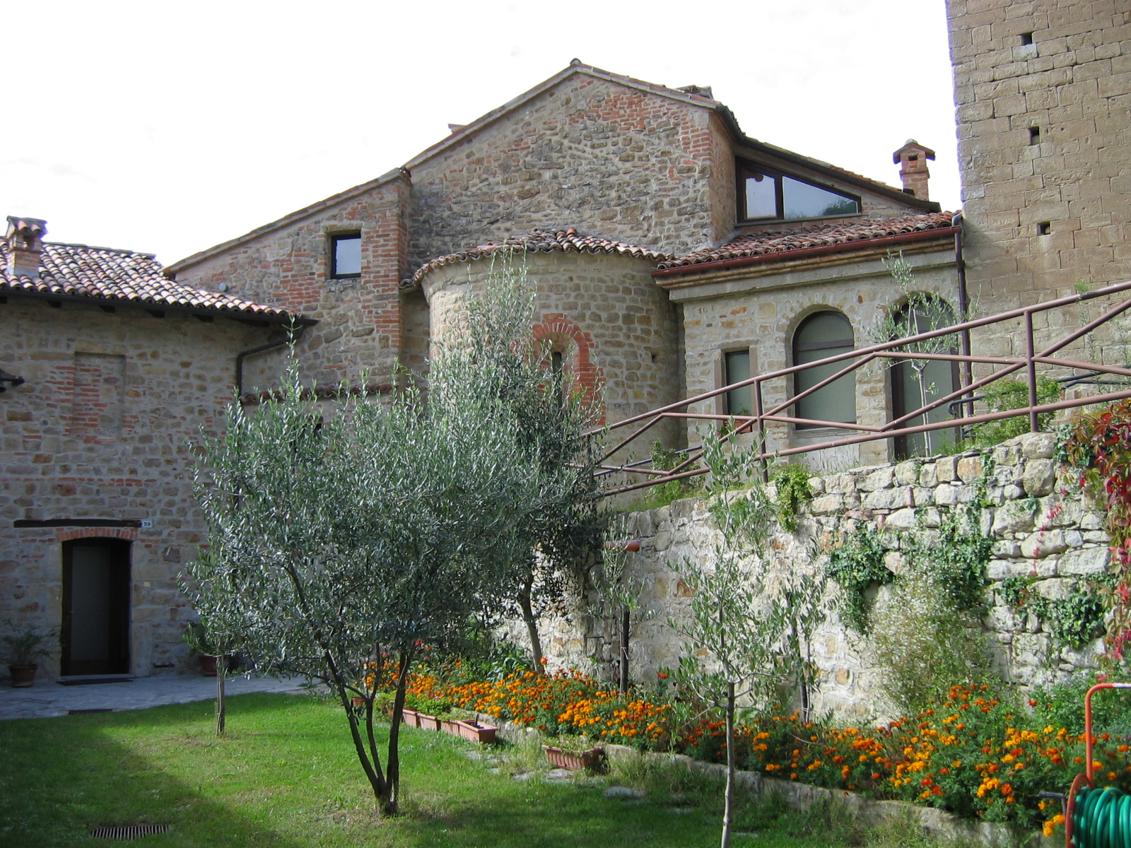 Eremo di Sant'Alberto di Butrio (Pavia), affidato agli Eremiti della Divina Provvidenza fondati da San Luigi Orione. Il chiostro interno.